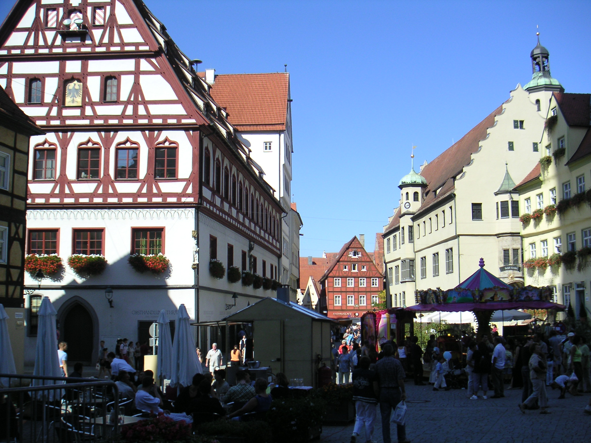 ネルトリンゲンの街並み